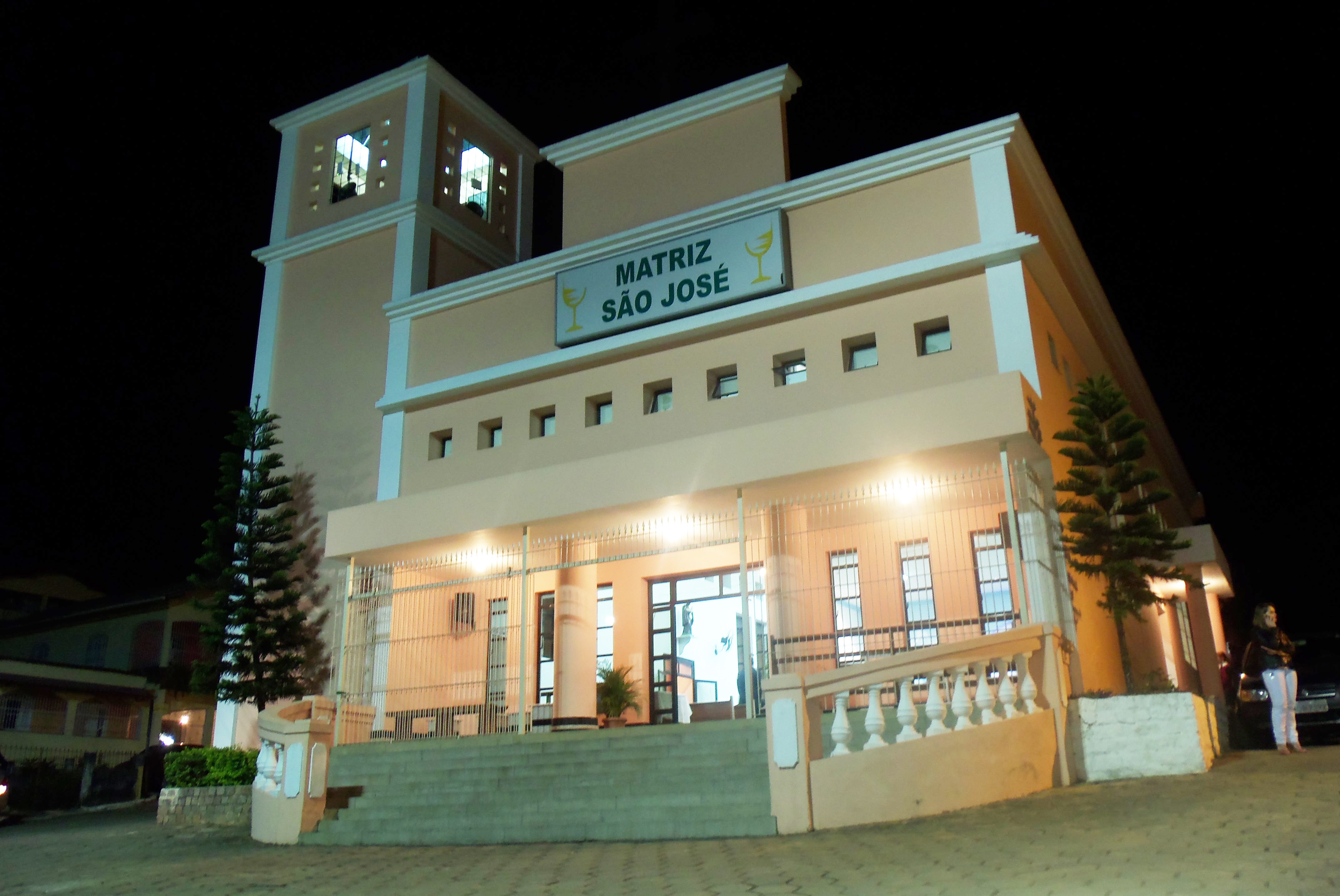 Igreja Matriz São José de Fundão à noite